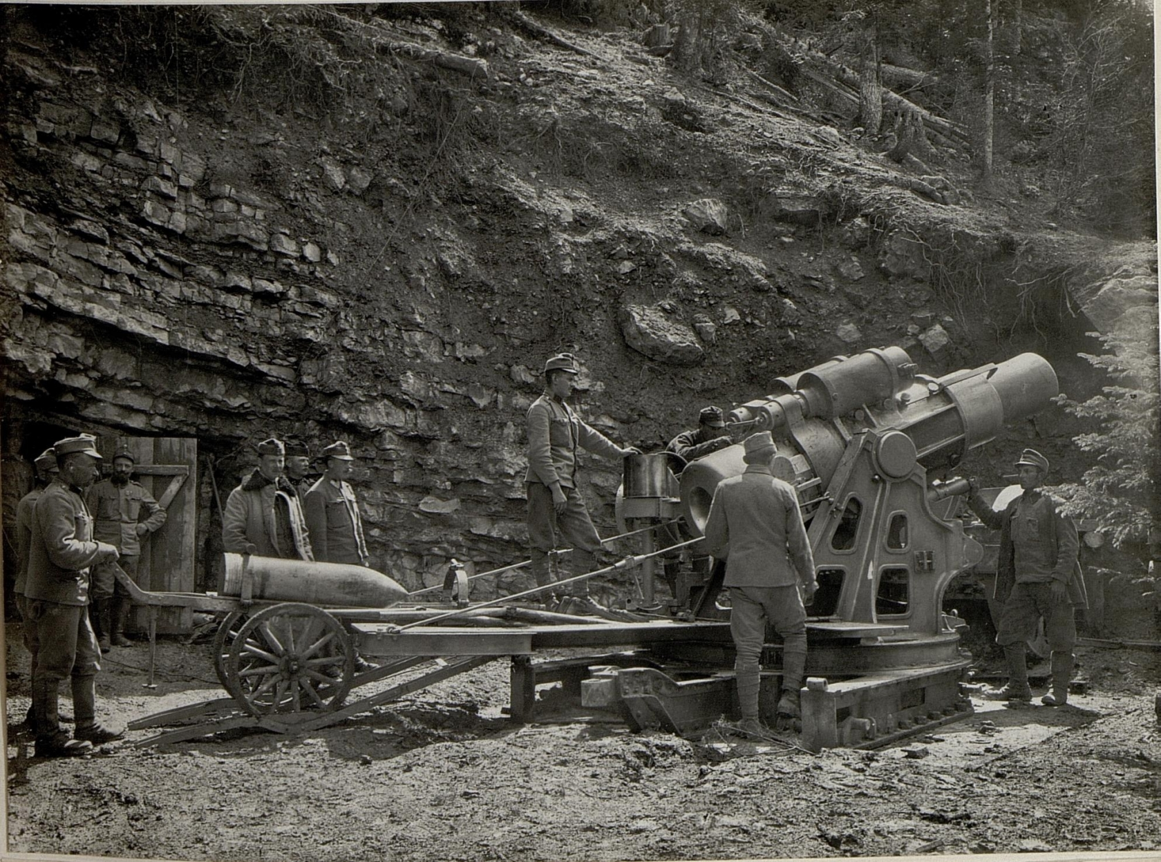 30.5 Mörser an der Lusernstrasse. Aufgenommen im Mai 1916.